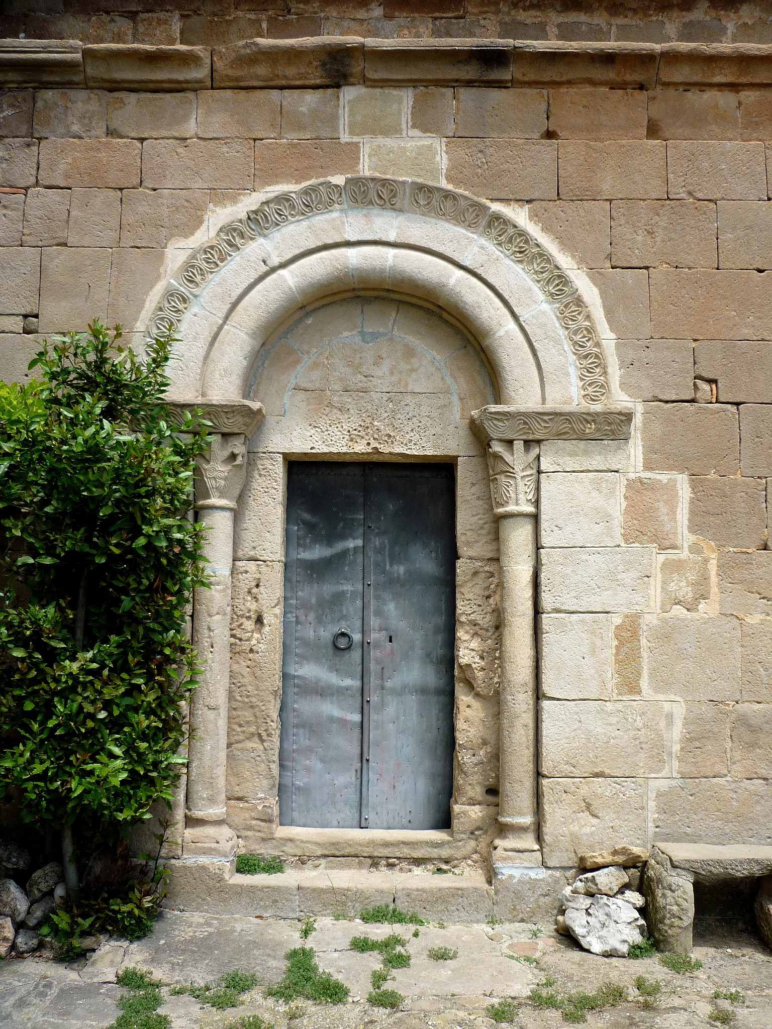 Església de Santa Maria de Torredenegó (Llobera): portal